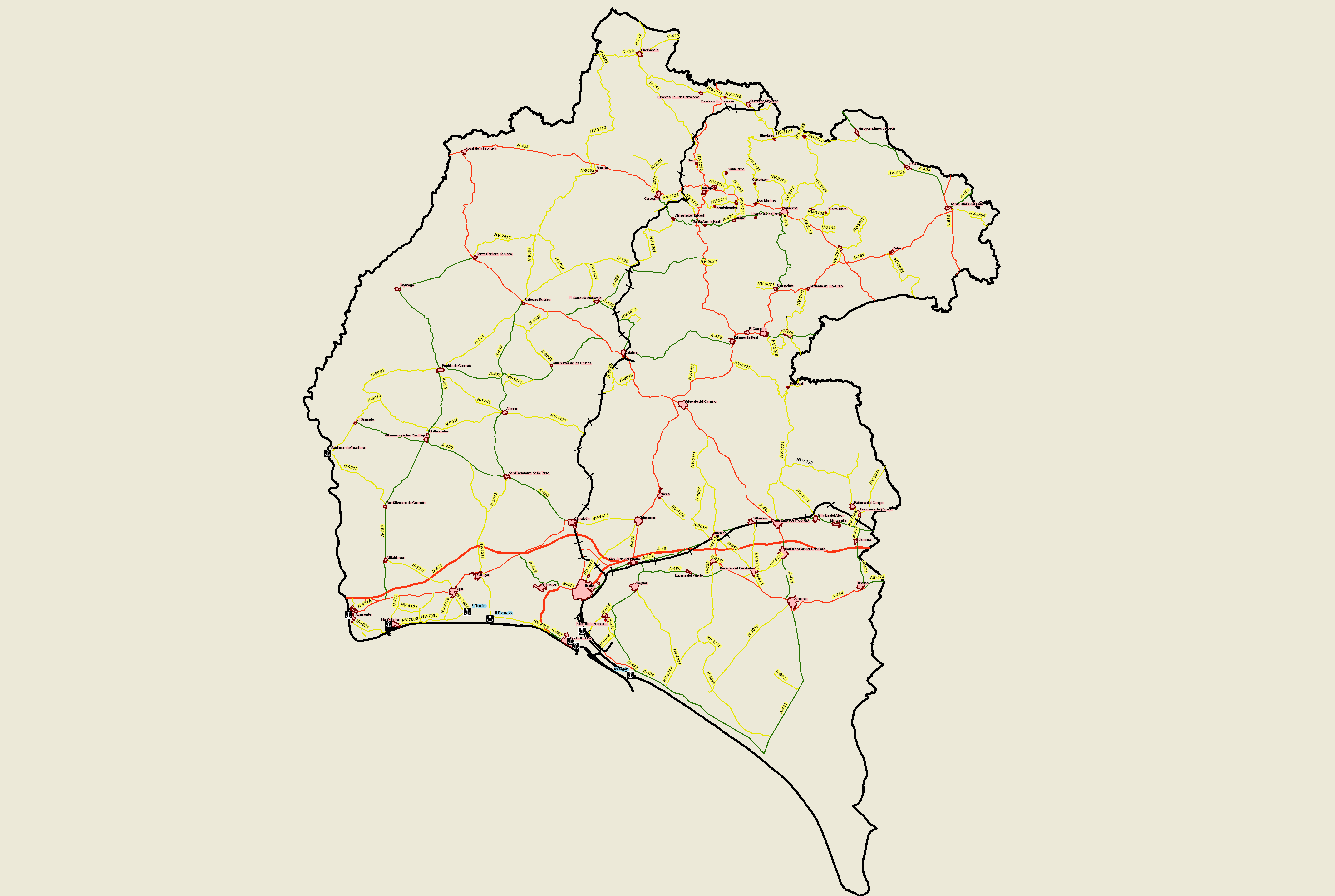 Mapa de comunicaciones de la provincia de Huelva